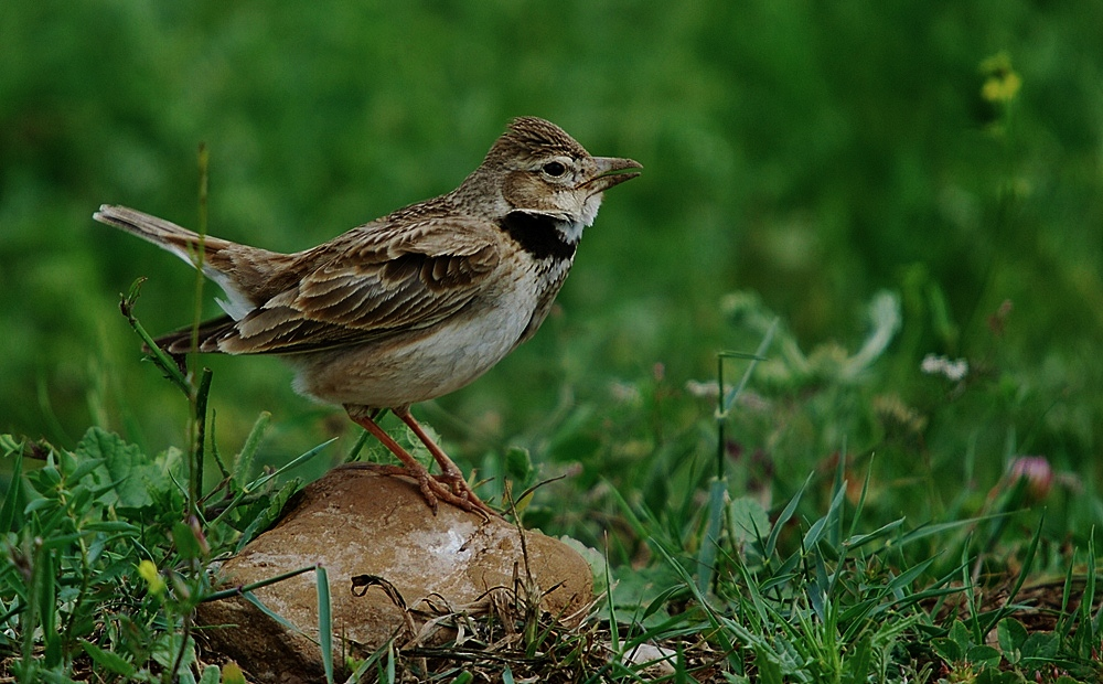 Melanocorypha calandra Kurdî: Li gundê Qereçolya hatiye kişandin